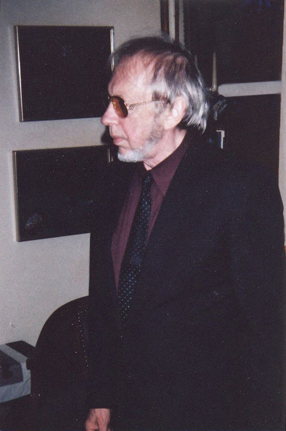 Svetozar Vlajković